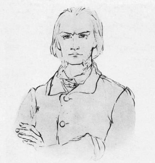 Раскольников. Рис. П. Боклевского. 1880-е годы